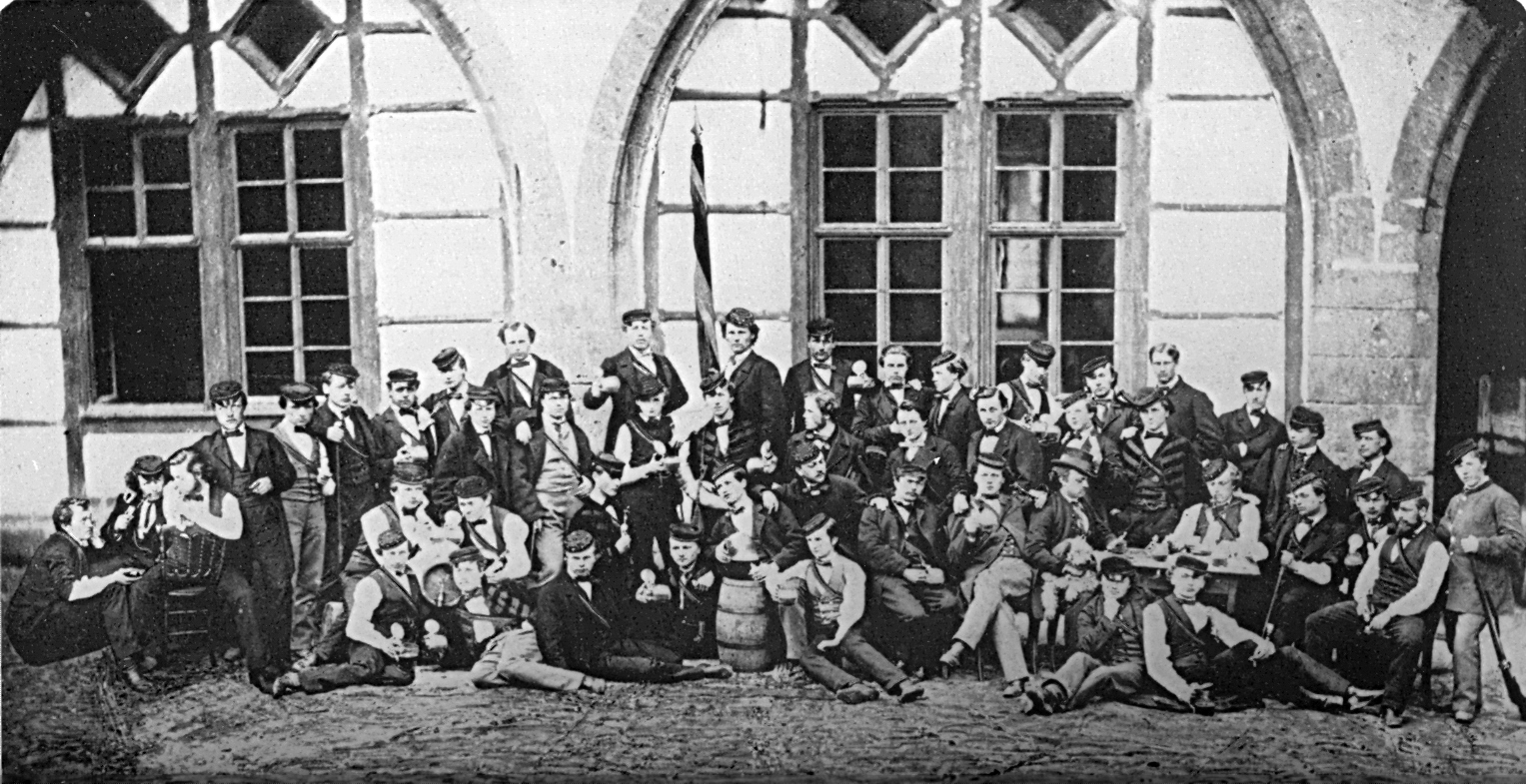 Die Tübinger Königsgesellschaft Roigel hinter dem Pfleghof (Fotomontage, kolorierter Albuminabzug)